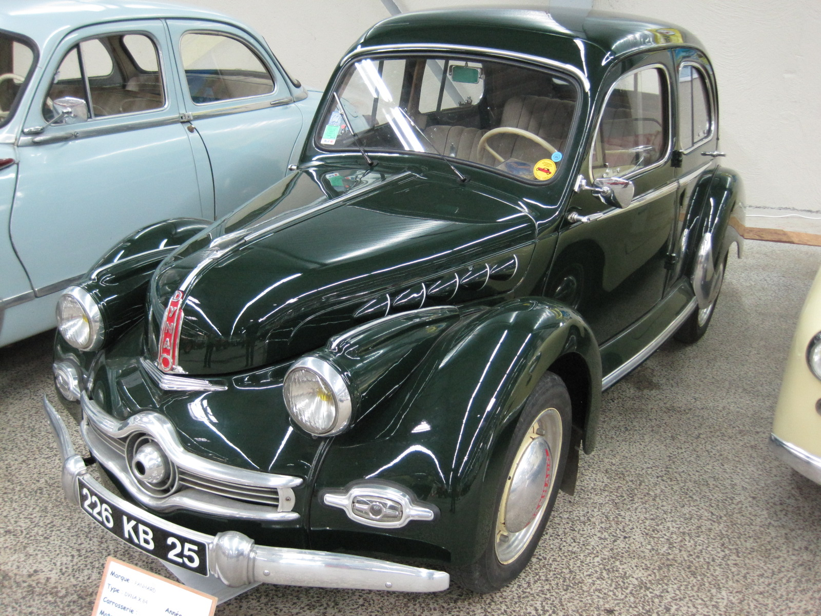 Panhard Dyna X 84 1951